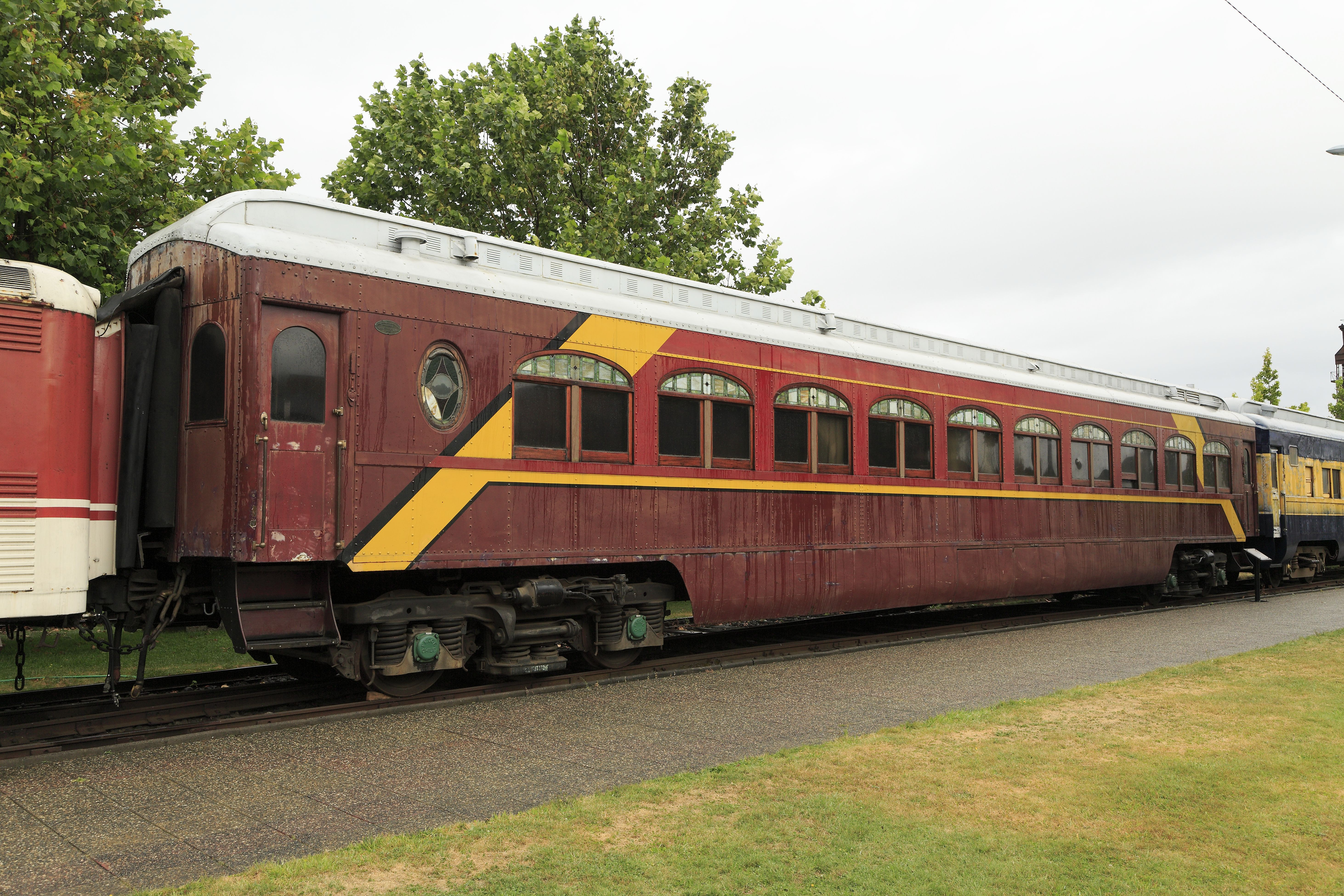 Salonwagen für den Präsidenten der Republik, gebaut 1923 bei Linke-Hofmann in Lauchhammer. Ausgerüstet ist der Wagen für den Präsident und seine Begleitung mit je einem eigenen Schlafraum sowie einem Salon mit Küche. Genutzt haben das Fahrzeug die Präsidenten Pedro Aguirre Cerda, Juán Antonio Ríos, Gabriel Gonzáles Videla, Carlos Ibáñez del Campo, Jorge Alessandri Rodriguez, Eduardo Frei Montalva, Salvador Allende Gossens und Patricio Aylwin Azócar. Im Lauf der langen Betriebszeit wurde der Wagen mehrmals modernisiert, erkennbar an den schraubengefederten Drehgestellen. Im Museum steht er seit Februar 2004.